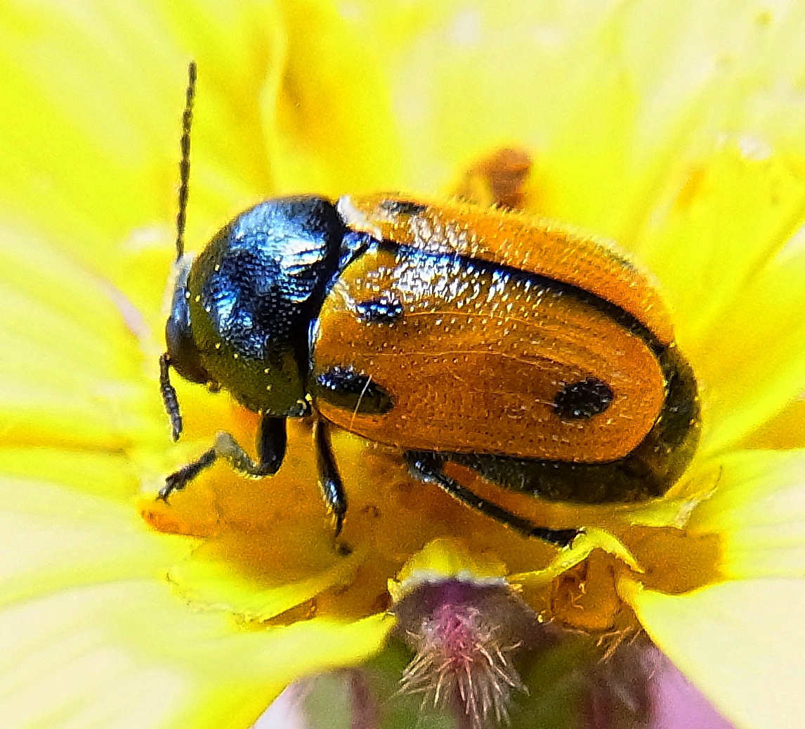 Cryptocephalus rugicollis aus Spanien, 25471 La Pobla de Cérvoles, LLeida am 8. Juni 2013